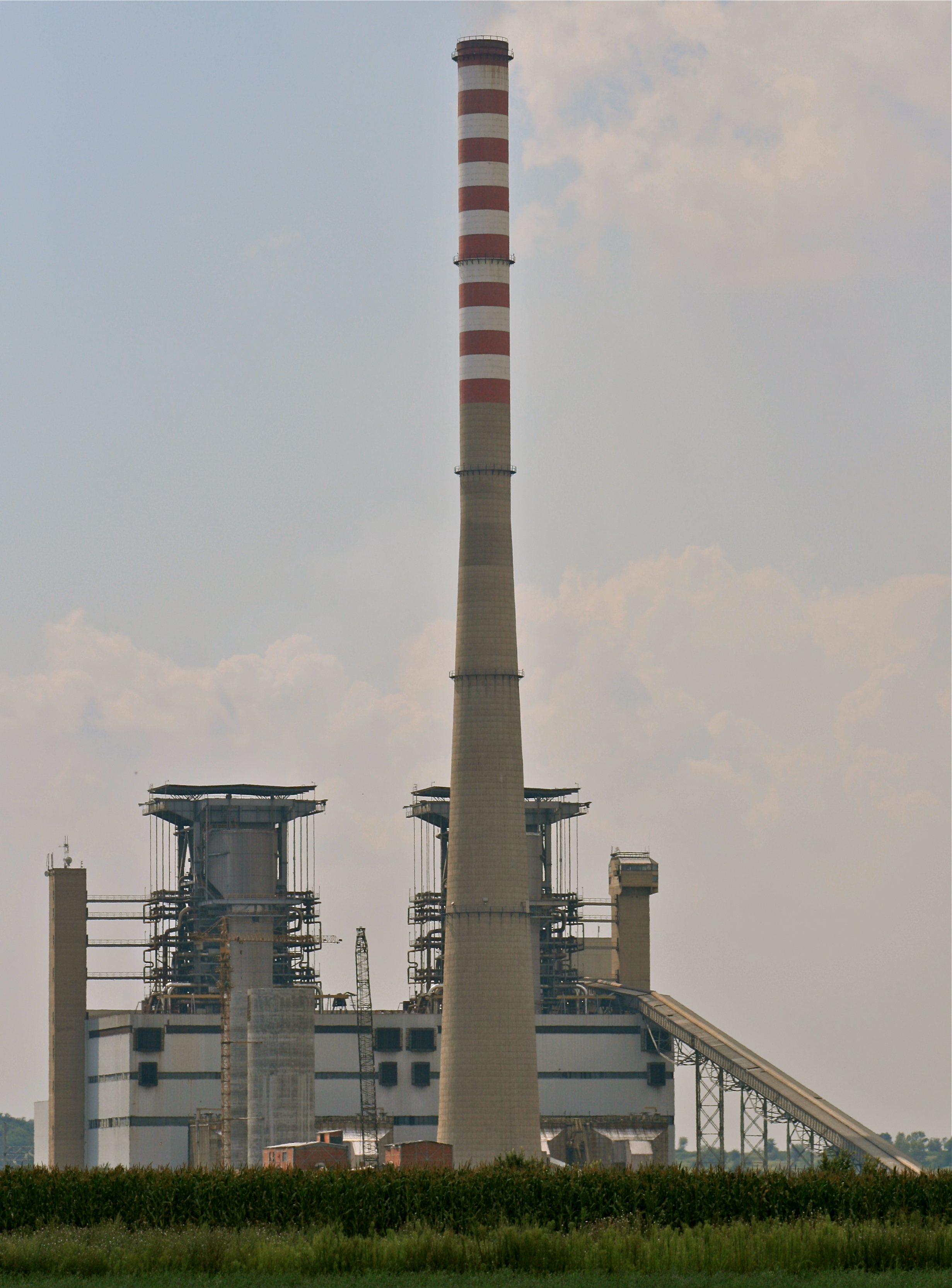 ТЕ Костолац Б